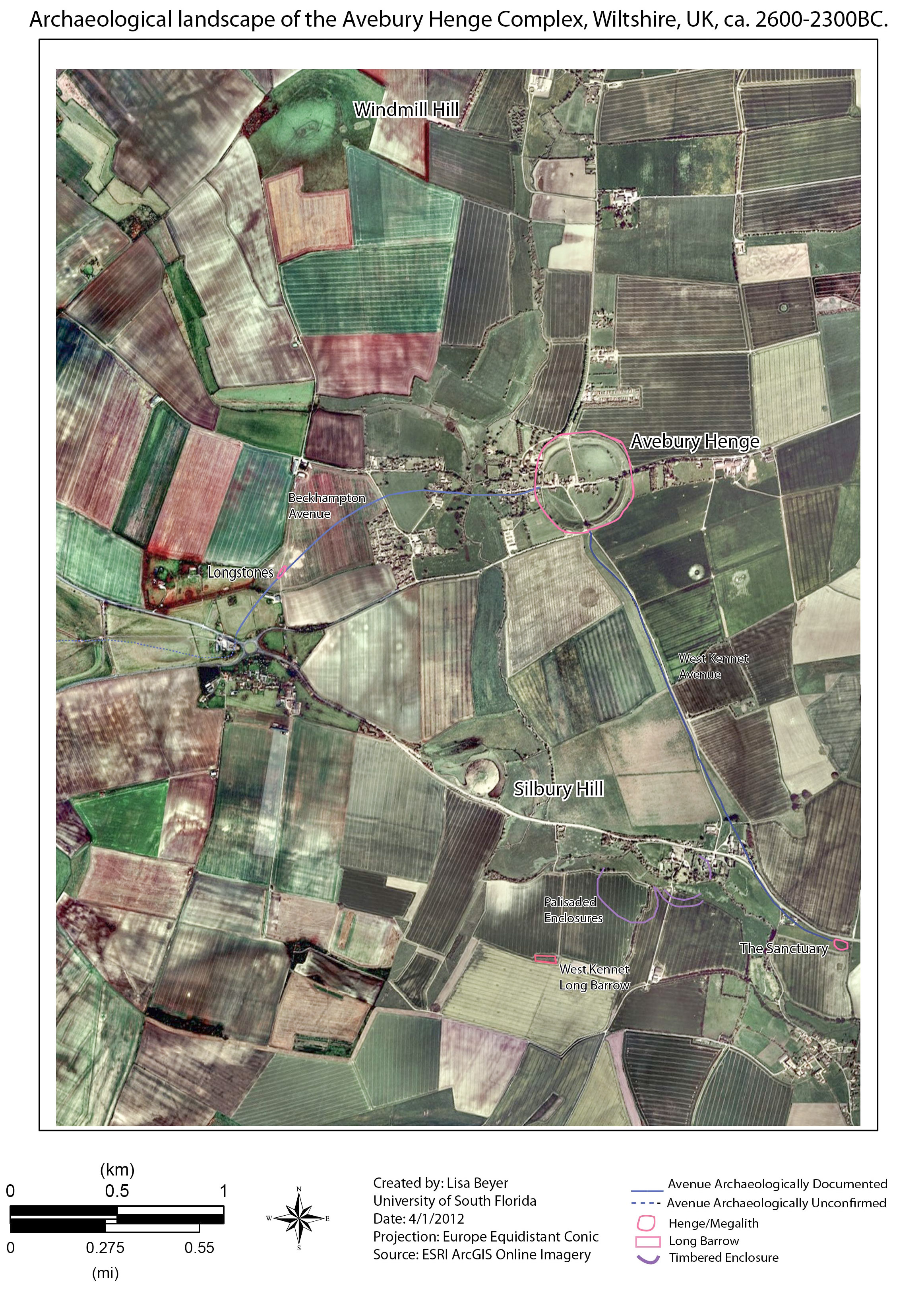 Vue aérienne du complexe archéologique d'Avebury, Wiltshire.